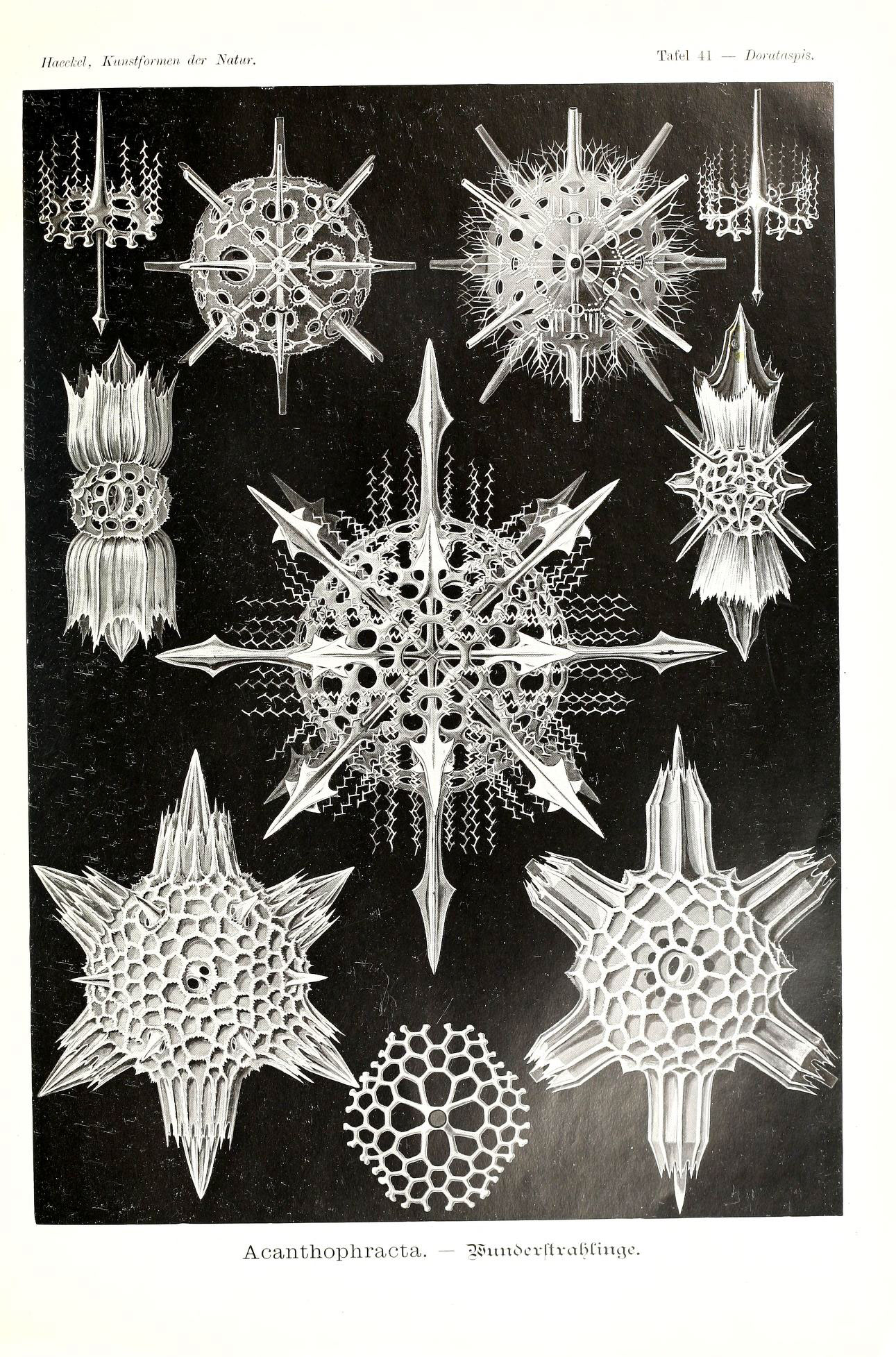 Haeckel, Kunstformen der Natur. Tafel 41 - - Dorataspis. Acanthophracta. £$imöerftvai?£mge.